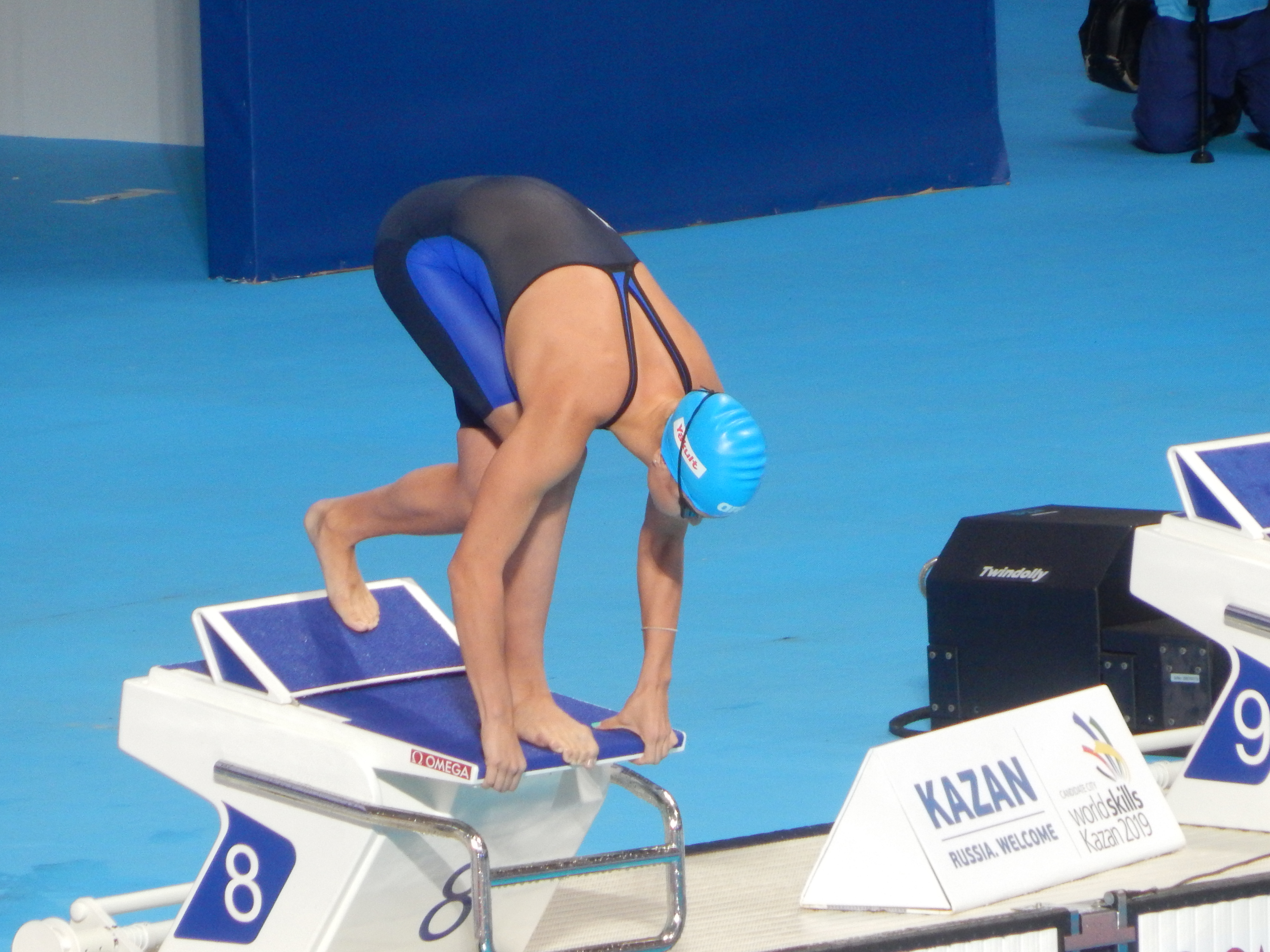 Мария Каменева перед полуфиналом на 50 метров вольным стилем в Казани